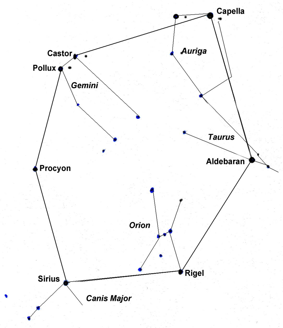 Wantersechseck